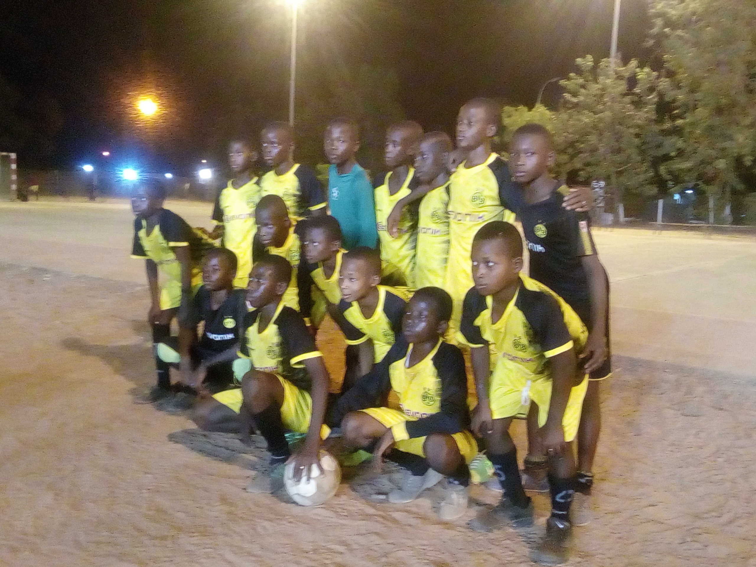 Équipe jeune de kamsar